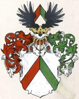 Dehni suguvõsa aadlivapp